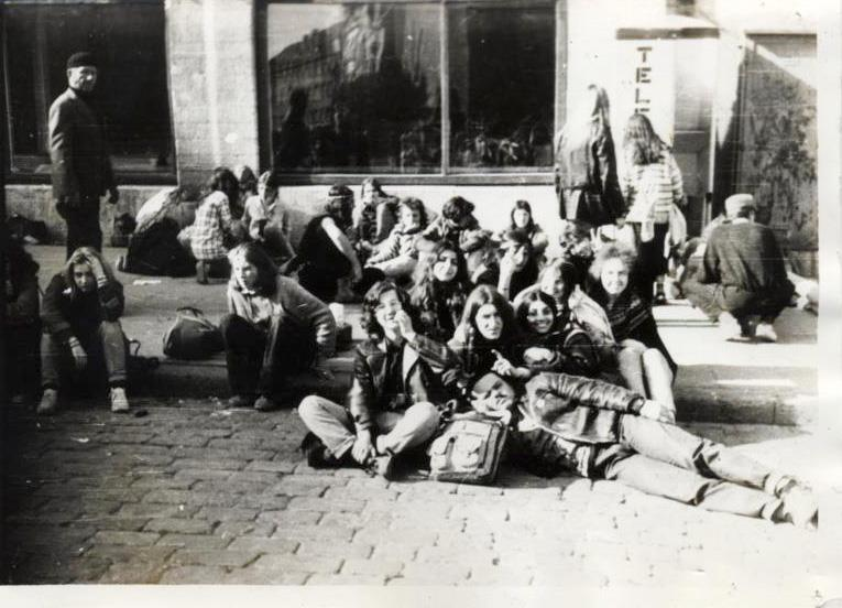 1989 год. Хиппи в Таллине